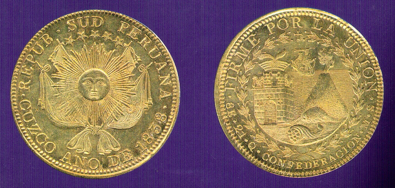 Golden coin